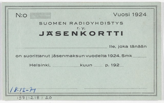 Suomen Radioyhdistys r.y. vuoden 1924 jäsenkortti